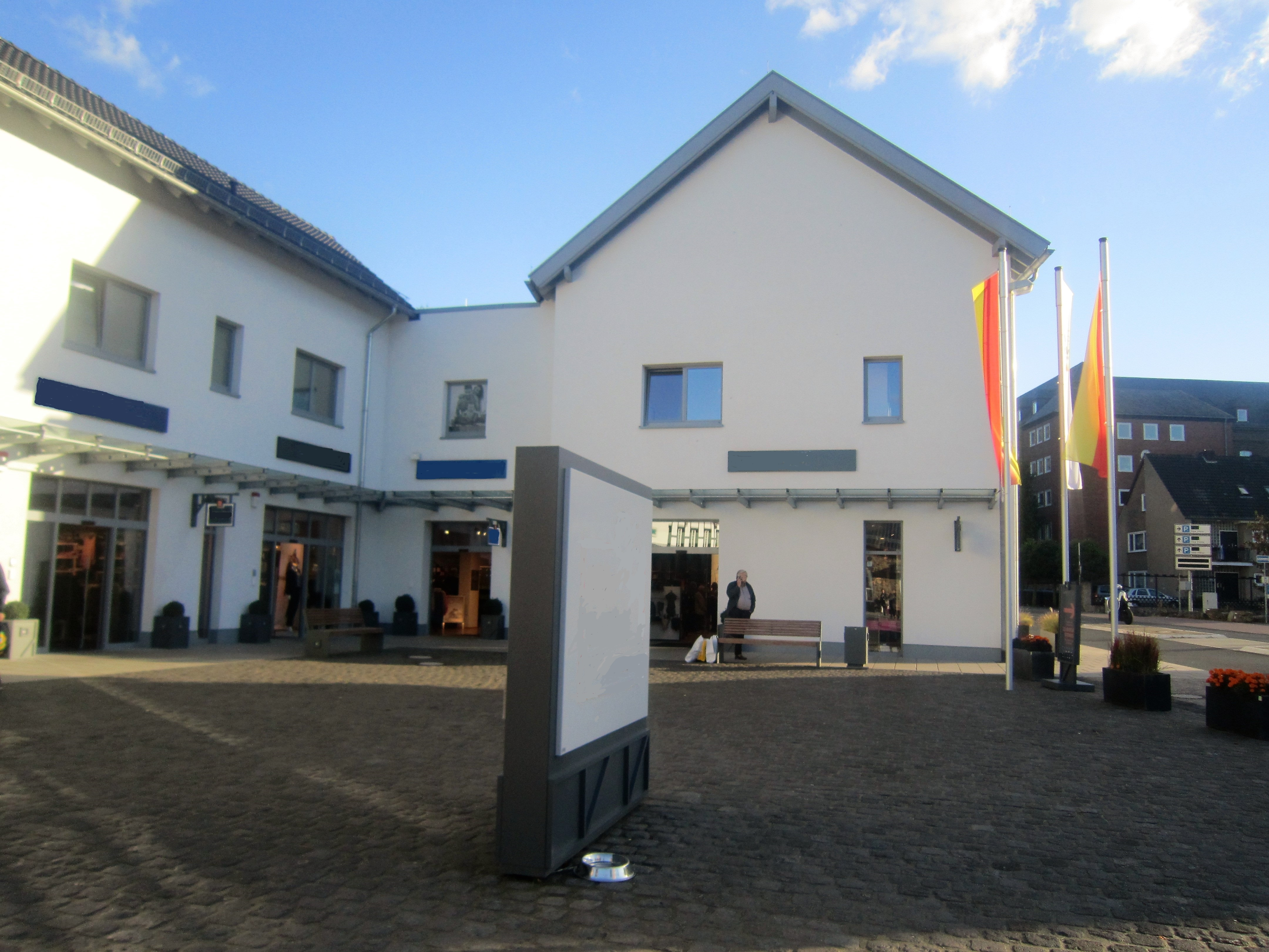 City Outlet Shops an der Trierer Straße in Bad Münstereifel